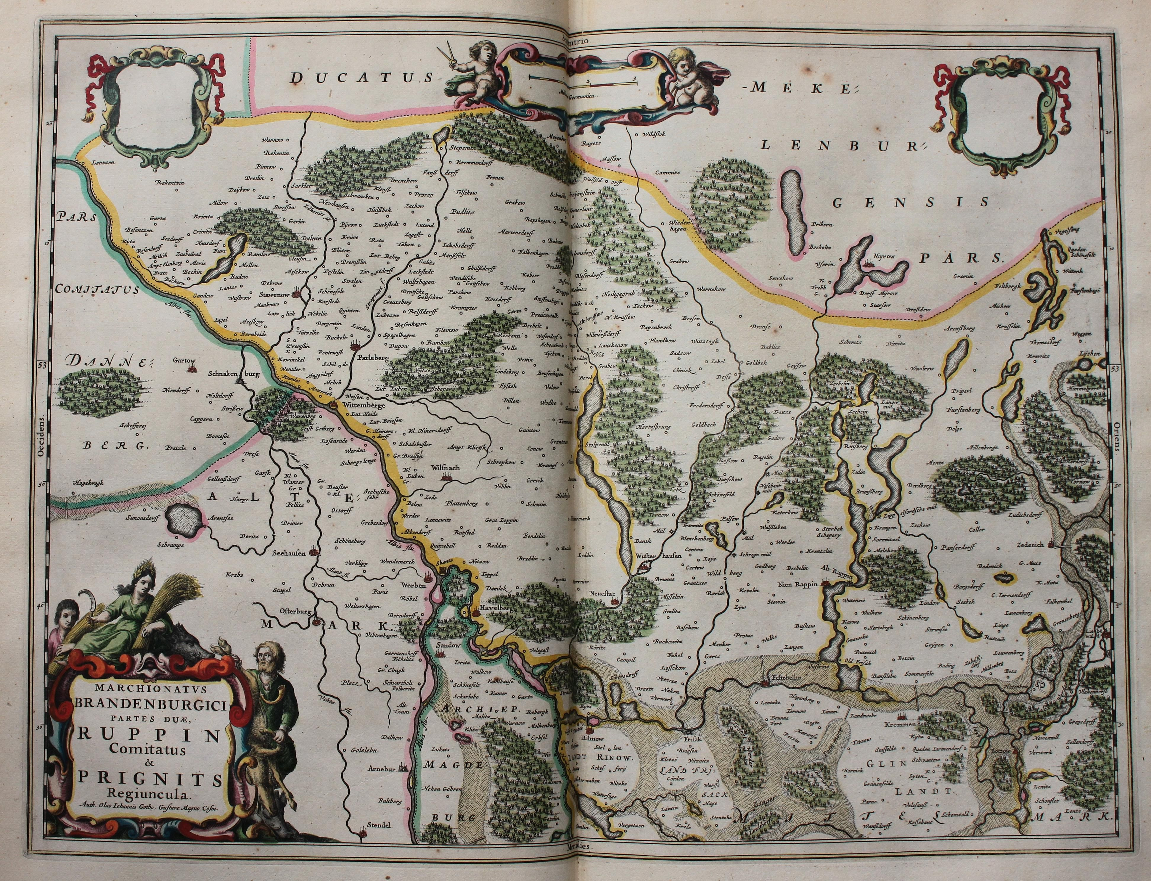 Descripción bibliográfica: Geographia Blaviana. - [Amsterdam : Juan Blaeu, 1659] . - [32], VI, 96 p., 34 f., h. 35a, 35b, 35c, 35d, 36-44 f., 34, [2], 36-40, [2], 43-70 [i. e. 75], [1] f., [20] p. de map., [9] f. de map., [4] f. pleg. de map., [2] f. de plan., [2] f. ge grab. : |bil. ; |cFol. marca major (57 cm.) . - En la dedicatoria a Felipe IV: "Presenta ... El Atlas Universal y Cosmographico de los orbes y terrestre ... Juan Blaeu" . - Título tomado del frontispicio. -- Privilegio fechado en 1659. -Errores de pag. - Sign.: 1, *2, **3, ***-****2, a-e2, A-I2, K1, L-Z2, Aa-Dd2, 4 2, Ee-Ff2, A-I2, K1, L2, M1, N-Y2, Z5, Aa-Dd2, Ee1, A-D2, E-F1, G-I2, K-L1, M-O2, P1, Q-Z2, Aa-Bb2, Cc1, Dd3, Ff-Zz2, Aaa-Bbb2, . - Frontispicio grab. col. -- Incluye un total de 49 il. entre map., plan. i grab. Materia: Atlas - Obras anteriores a 1800 Impresor: Blaeu, Joan, 1596-1673, imp. Lugar de impresión: Holanda. Amsterdam Localización: Vea la ilustración en su contexto Visite también la exposición "Cartografía histórica en la Biblioteca de la Universidad de Sevilla"